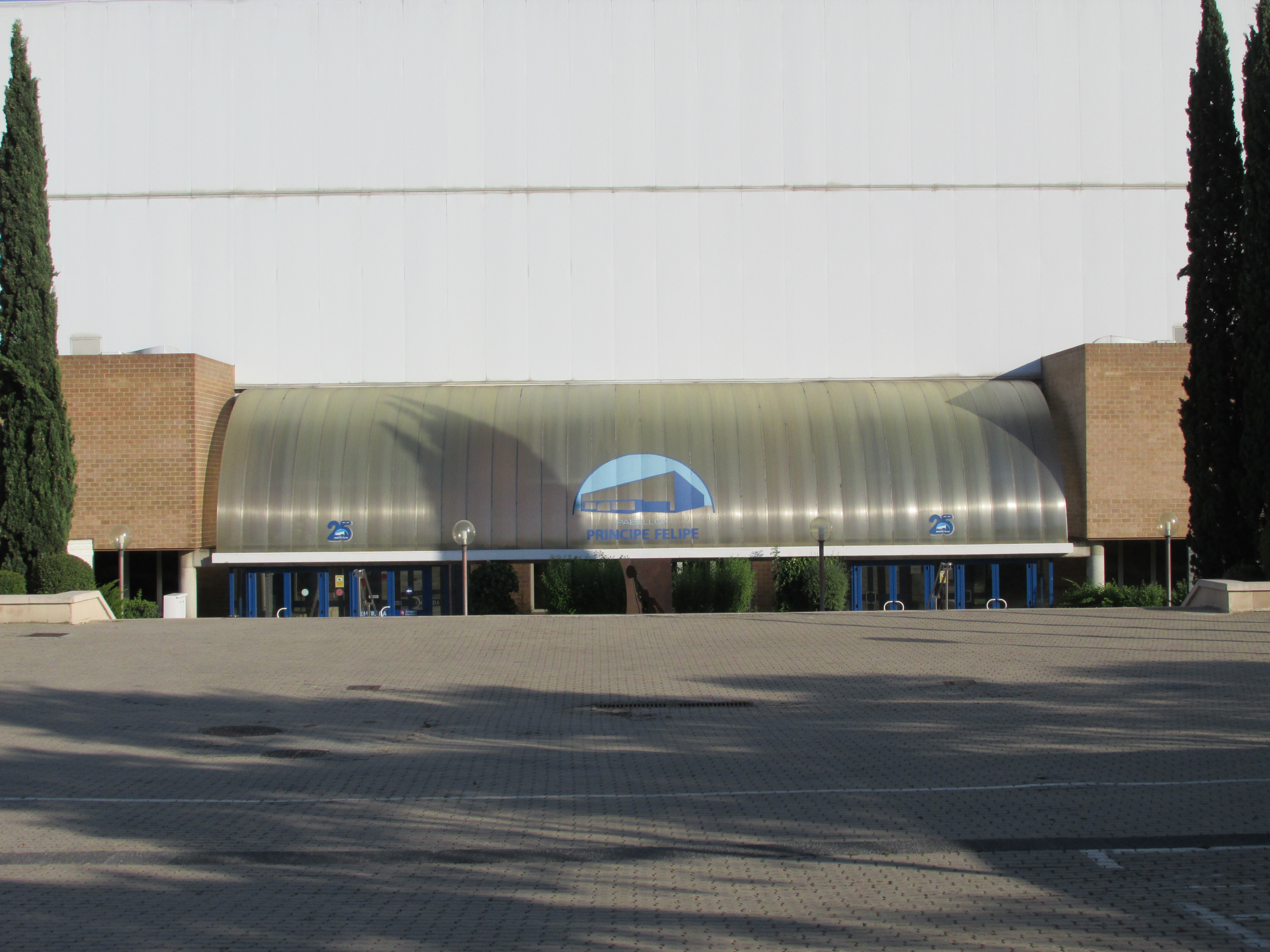 Pabellón PRINCIPE FELIPE Agosto 2015